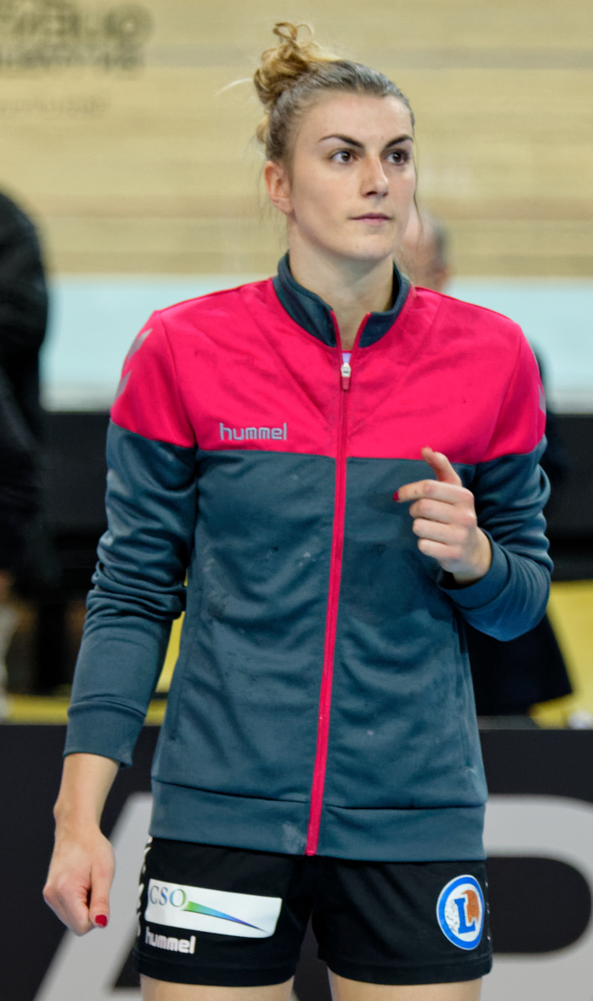 Rencontre de championnat entre Issy Paris et Brest. Au vélodrome de saint Quentin en Yvelines, le 25 mars 2017.